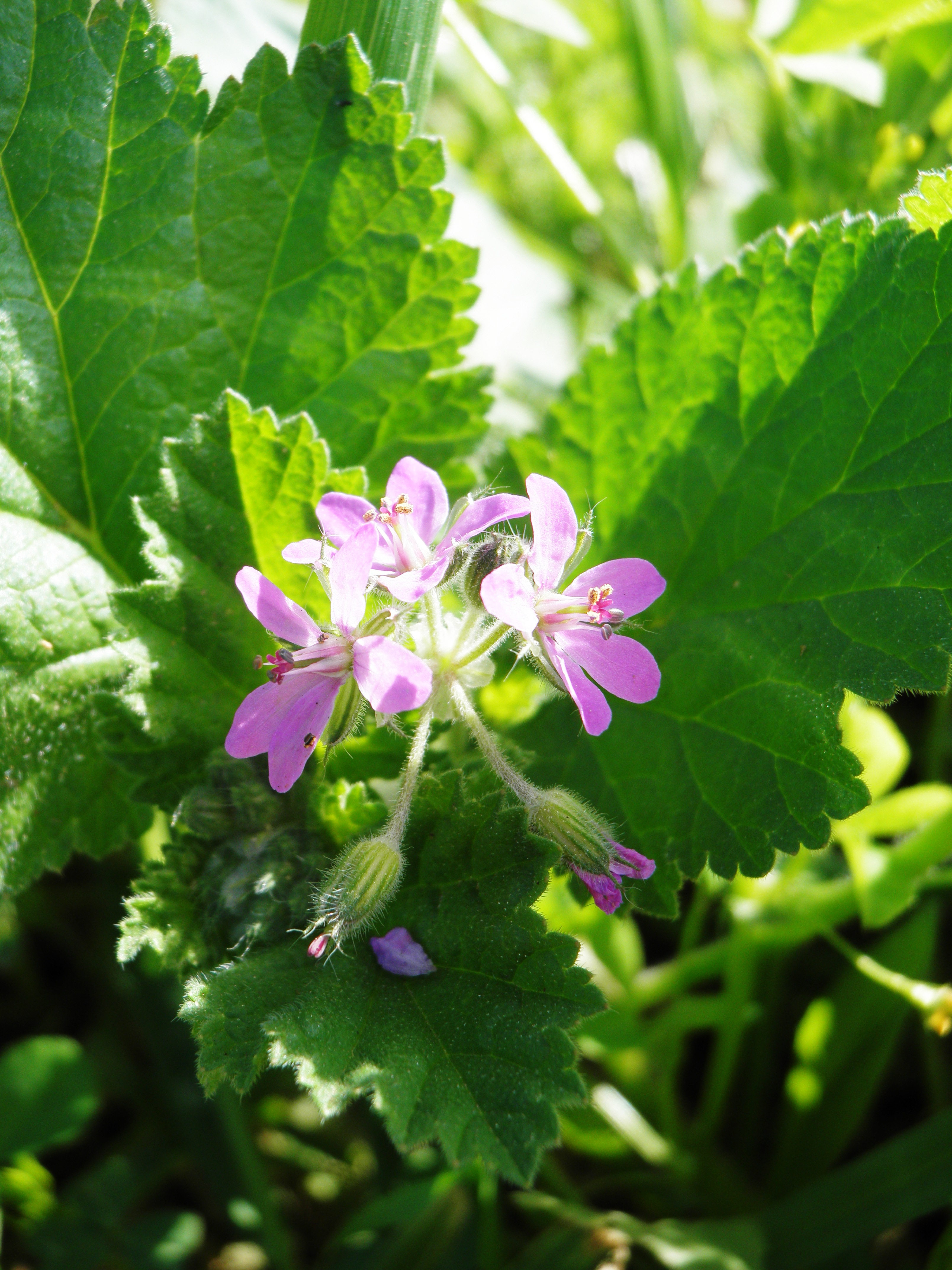 flowers מקור חסידה חלמיתי